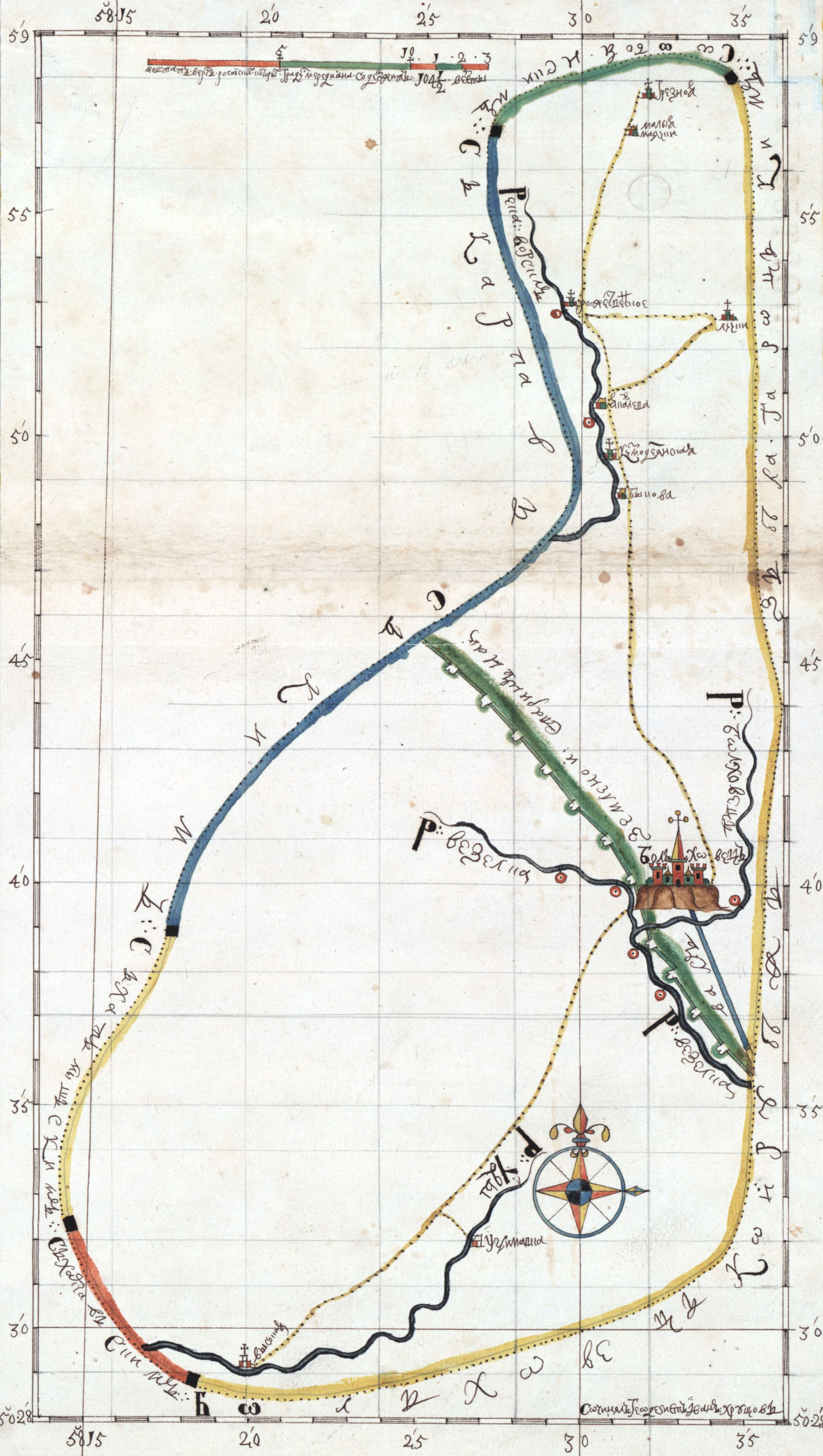 Территория Болховец / геодезист Иван Хрущёв. Автор: Хрущев, Иван. картограф. Дата публикации: 1724-1729. Тема: Белгород, Правительство. Тема: Болховец - Окрестности. Рукописный картографический материал. Карта. Неподвижное изображение. Язык: французский. Формат: 1 полет: мс ; 45 х 25 см. Формат: изображение / JPEG. Формат: Общее количество просмотров: 1. Описание: Масштаб (ы): [1: 133 375], 13 верст [= 10,4 см]. Права: общественное достояние. Имя пользователя: ковчег: / 12148 / btv1b550030947. Источник: Национальная библиотека Франции, GE BB-124 (109RES)крышка: Россия. Каталог уведомление: Примечание к коллекции: Принадлежит: [Рукописные открытки из собрания Иосифа Николая Делисла на территории России в период с 1724 по 1729 год]Каталог уведомление: Национальная библиотека Франции. Дата онлайн публикации: 24/10/2011